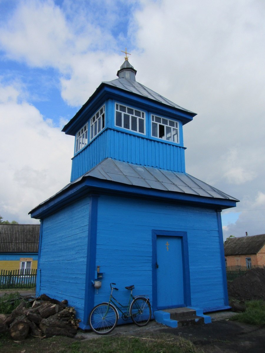 Плотніца. Пакроўская царква